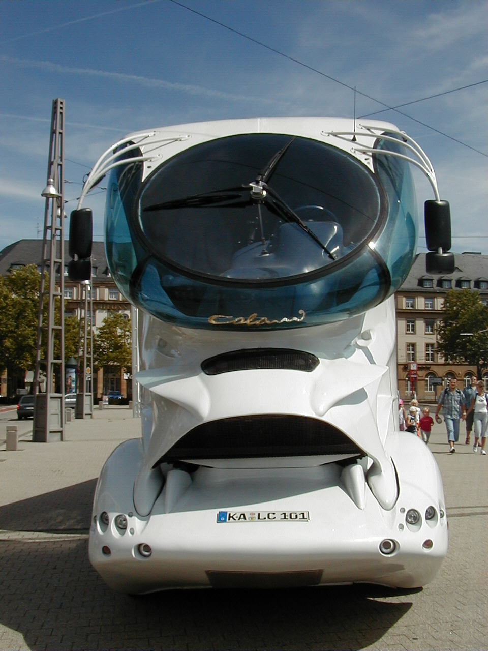 Грузовик Colani